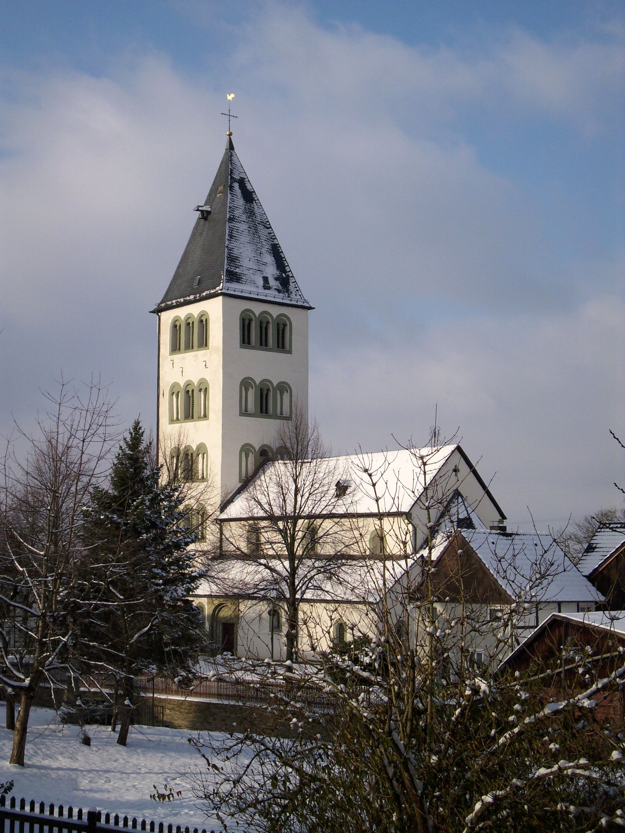 Dorfkirche in Soest-Ostönnen nach dem einfachen romanischen Basilikenschema: erhöhtes Mittelschiff mit zwei niedrigeren Seitenschiffen; im Osten schließt sich in gleicher Breite und Höhe das Chorviereck mit Apsis an; erstmals schriftlich erwähnt 1169; Turm aus der ersten Hälfte des 12. Jh., Mittelschiff und Chor aus der 2. Hälfte des 12. Jh.